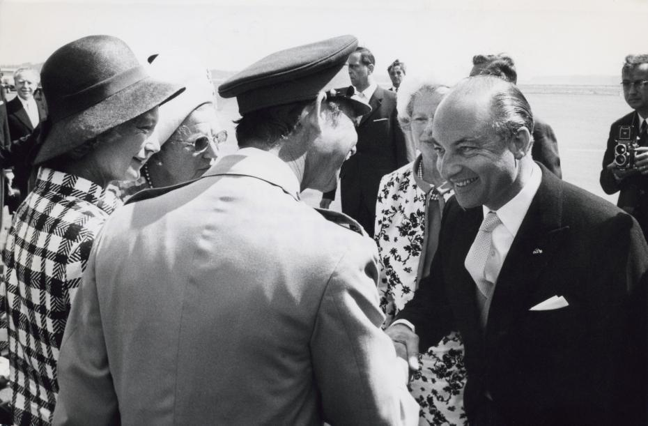 Wilhelm Klaus Norbert Schmelzer. Vandaag begon het tweedaagse staatsbezoek van Hare Majesteit de Koningin aan Luxemburg. Na aankomst op het vliegveld van Luxemburg wordt de minister van Buitenlandse Zaken Norbert Schmelzer begroet door de Groothertog Jan